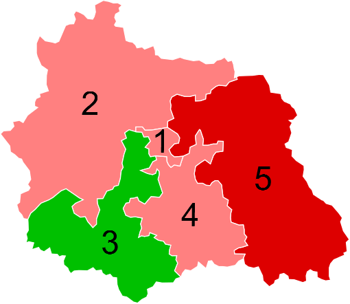 Résultats des élections législatives du Puy-de-Dôme en 2012